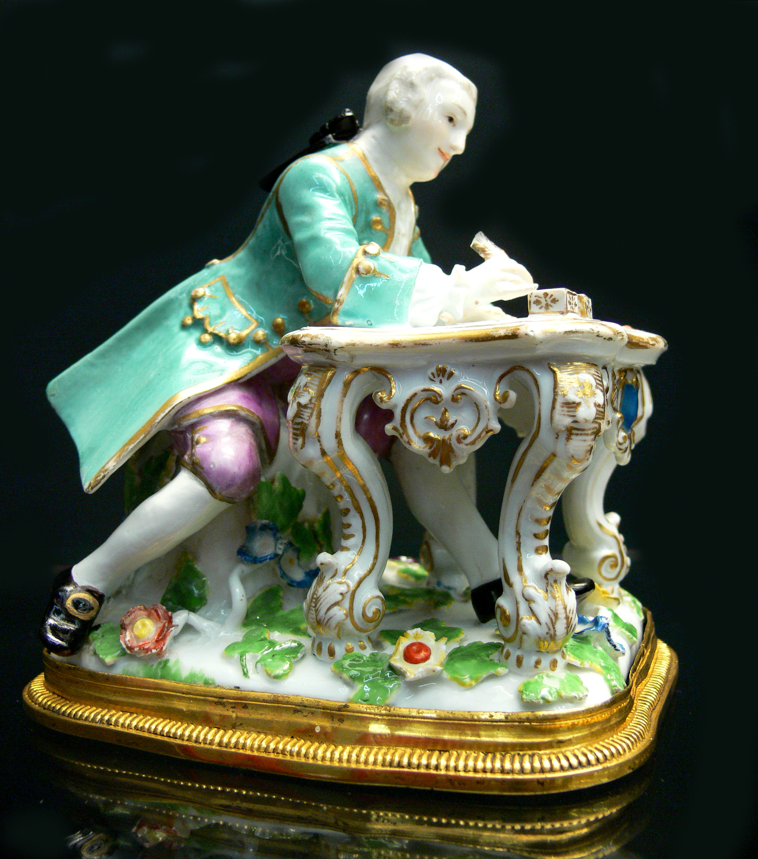 Kavalier am Schreibtisch, Figur von Johann Joachim Kändler, Meißener Porzellan, um 1740. Reiss-Engelhorn-Museen, Mannheim (Zeughaus)